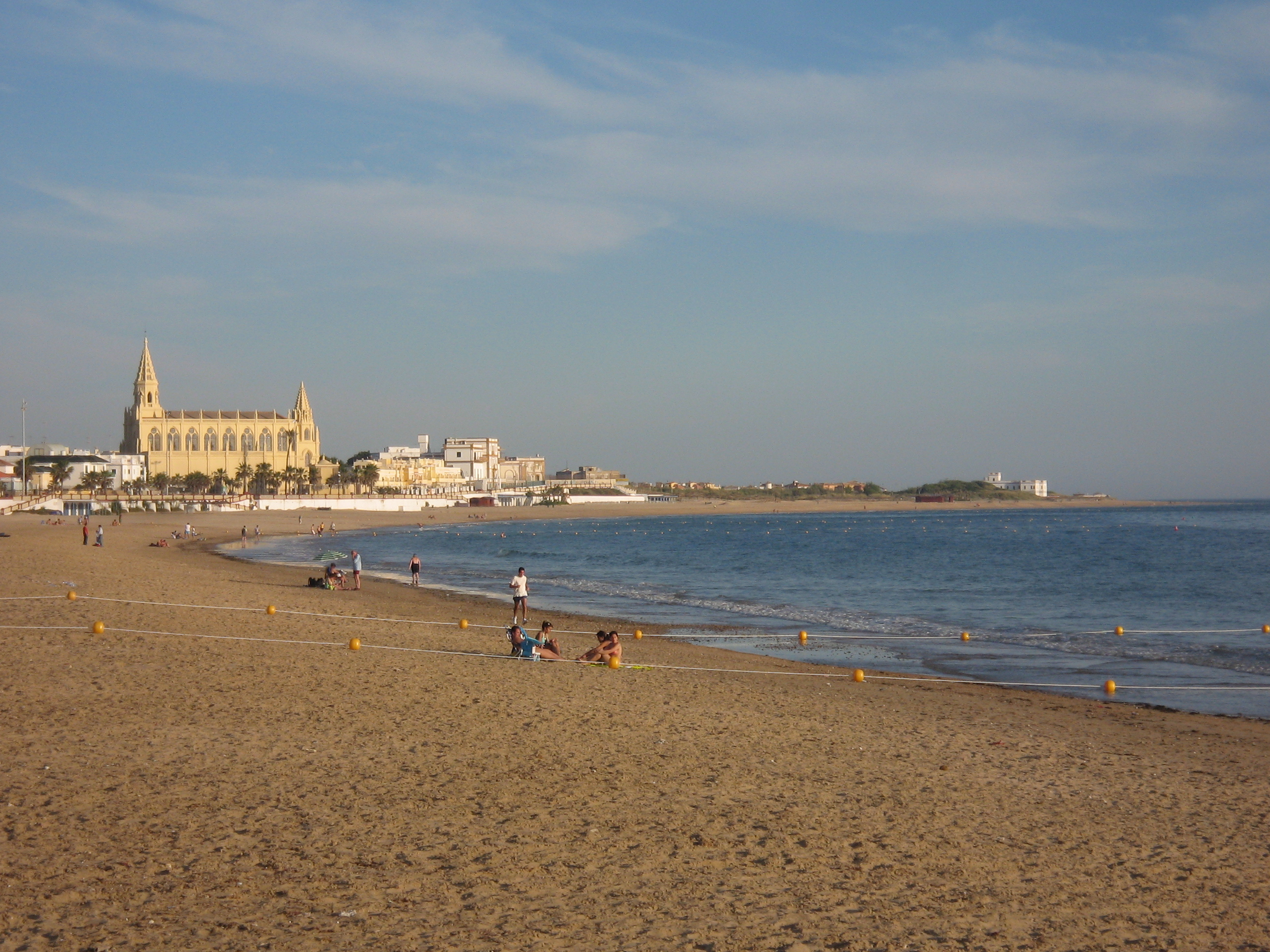 Playa de Regla, en Chipiona (España) / Beach in Chipiona, Spain